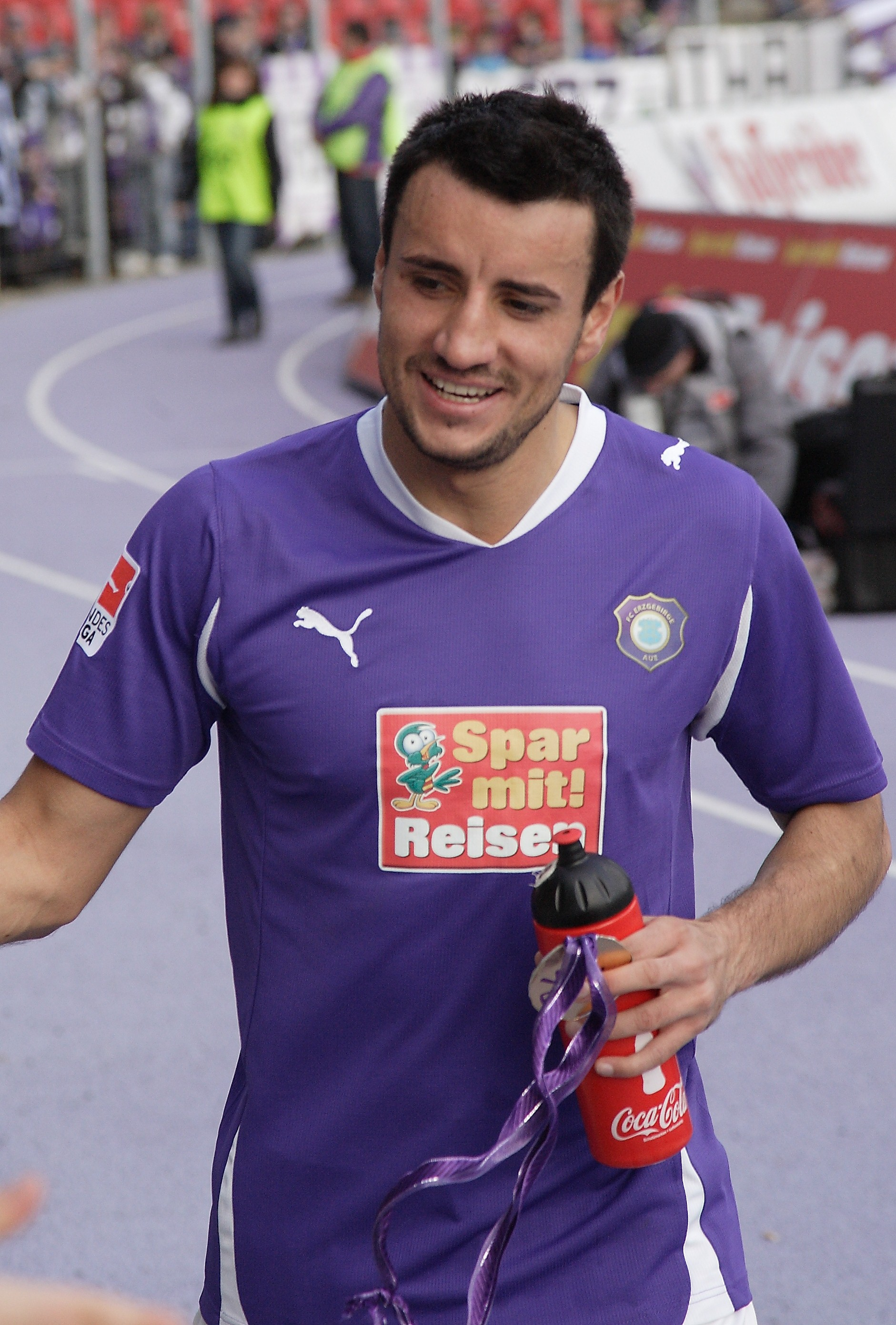 Alban Ramaj